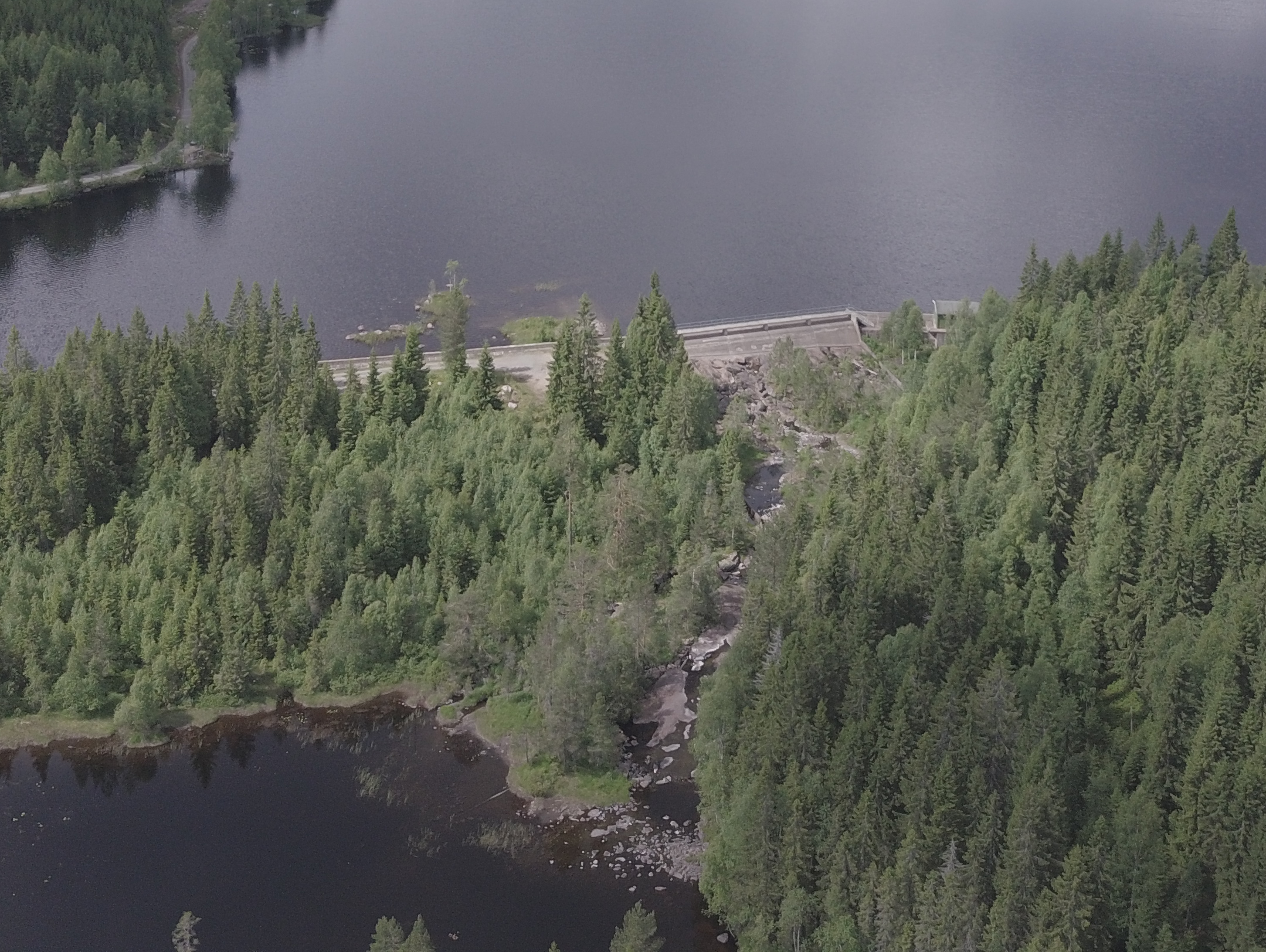 Bjertnessjøen i Romeriksåsene